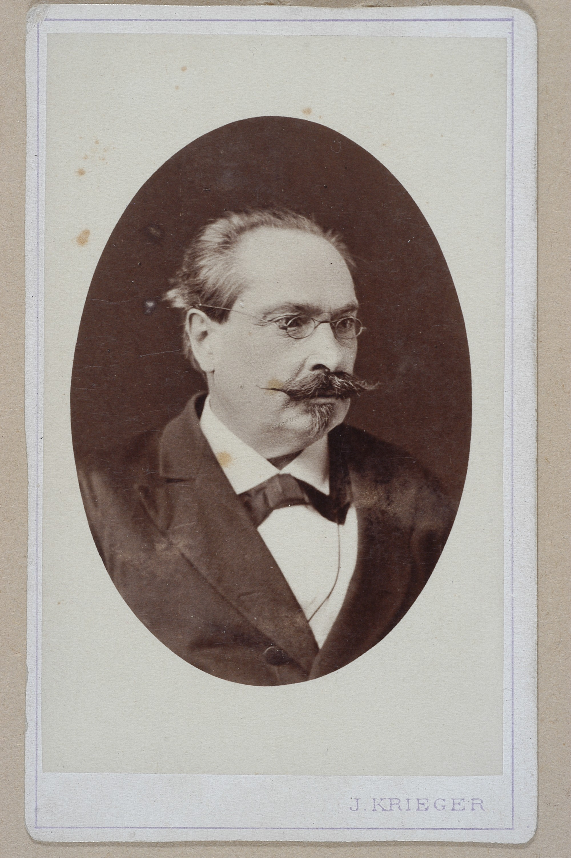 Adam Honory Kirkor, 1881 r.